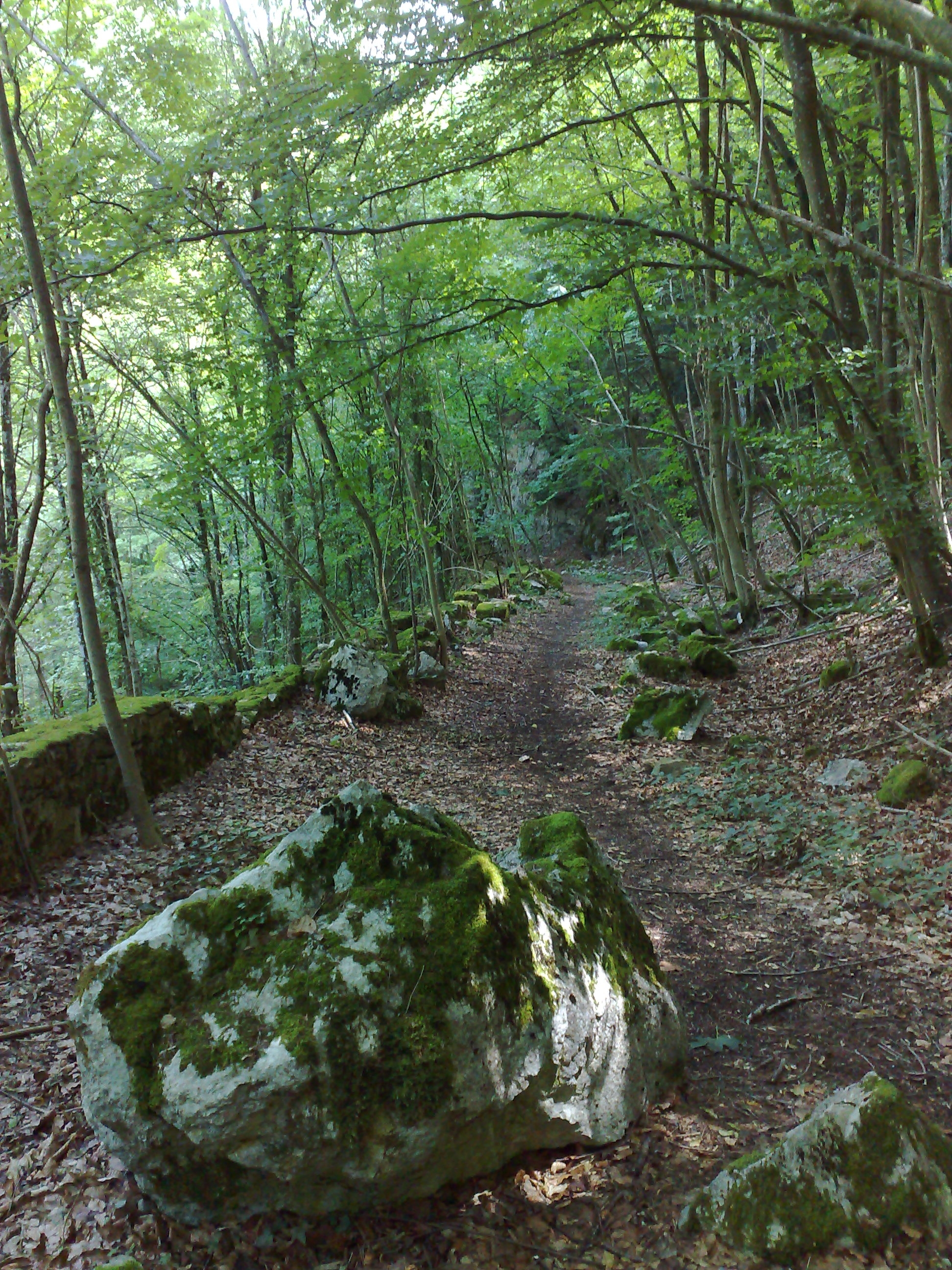 Ancienne route des bains de la Caille en Haute-Savoie, France.